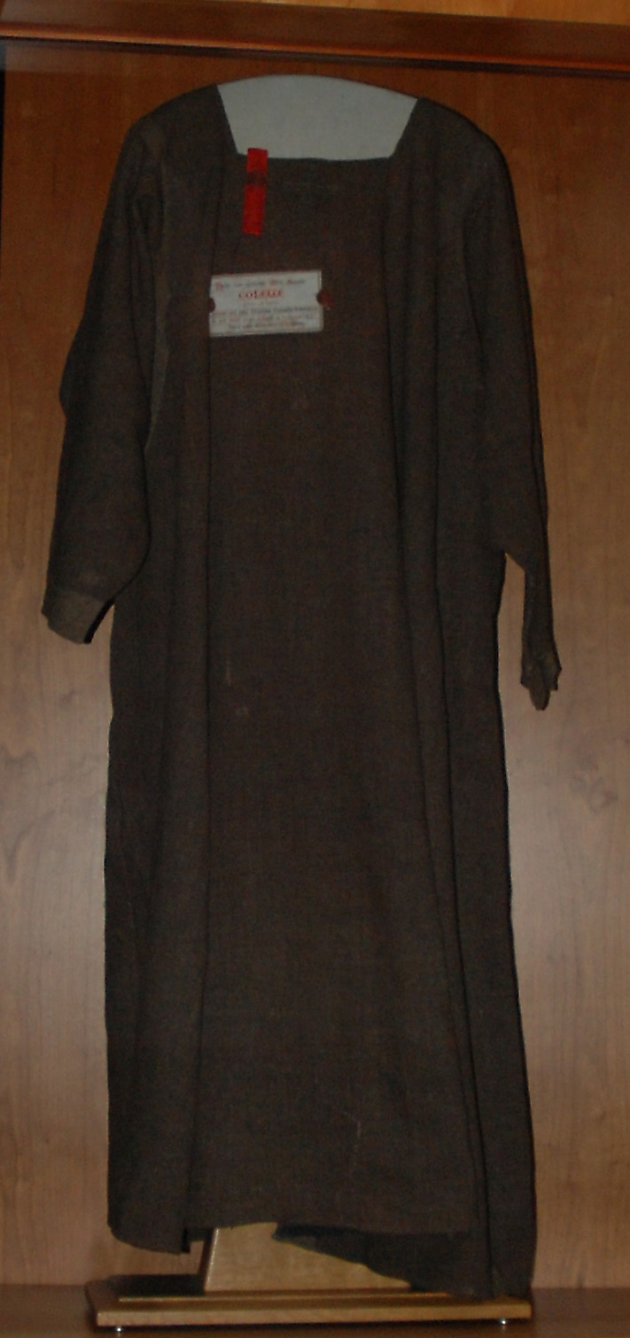 het habijt van de heilige Coleta (Nicolette Boëllet) in het Monasterium Bethlehem te Gent, België